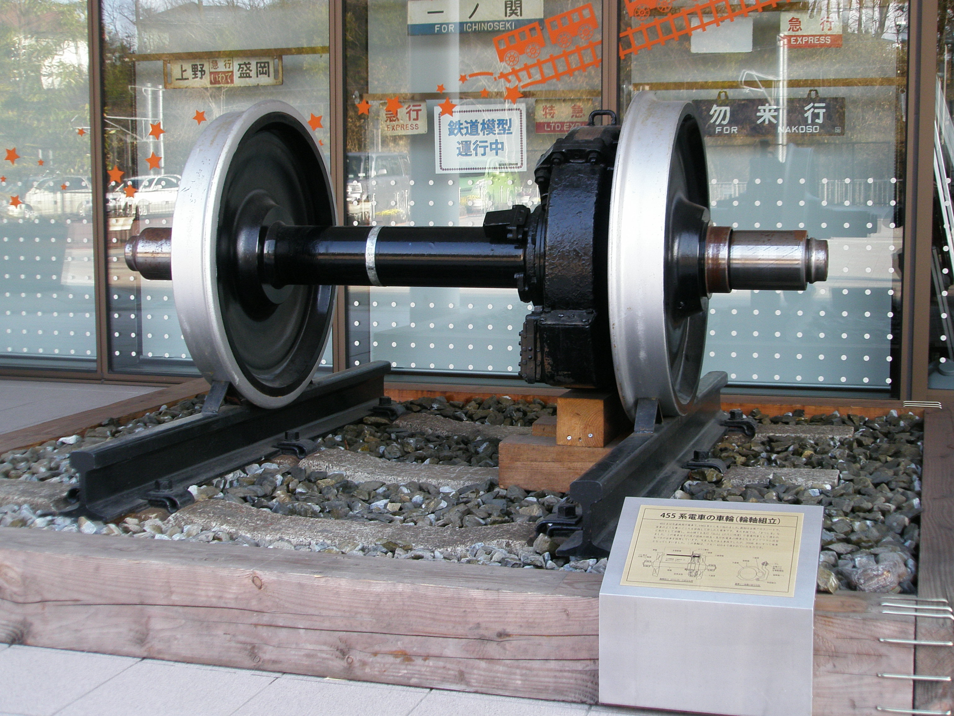 東北福祉大学ステーションキャンパス館では455系の車輪がモニュメントとして展示されている。